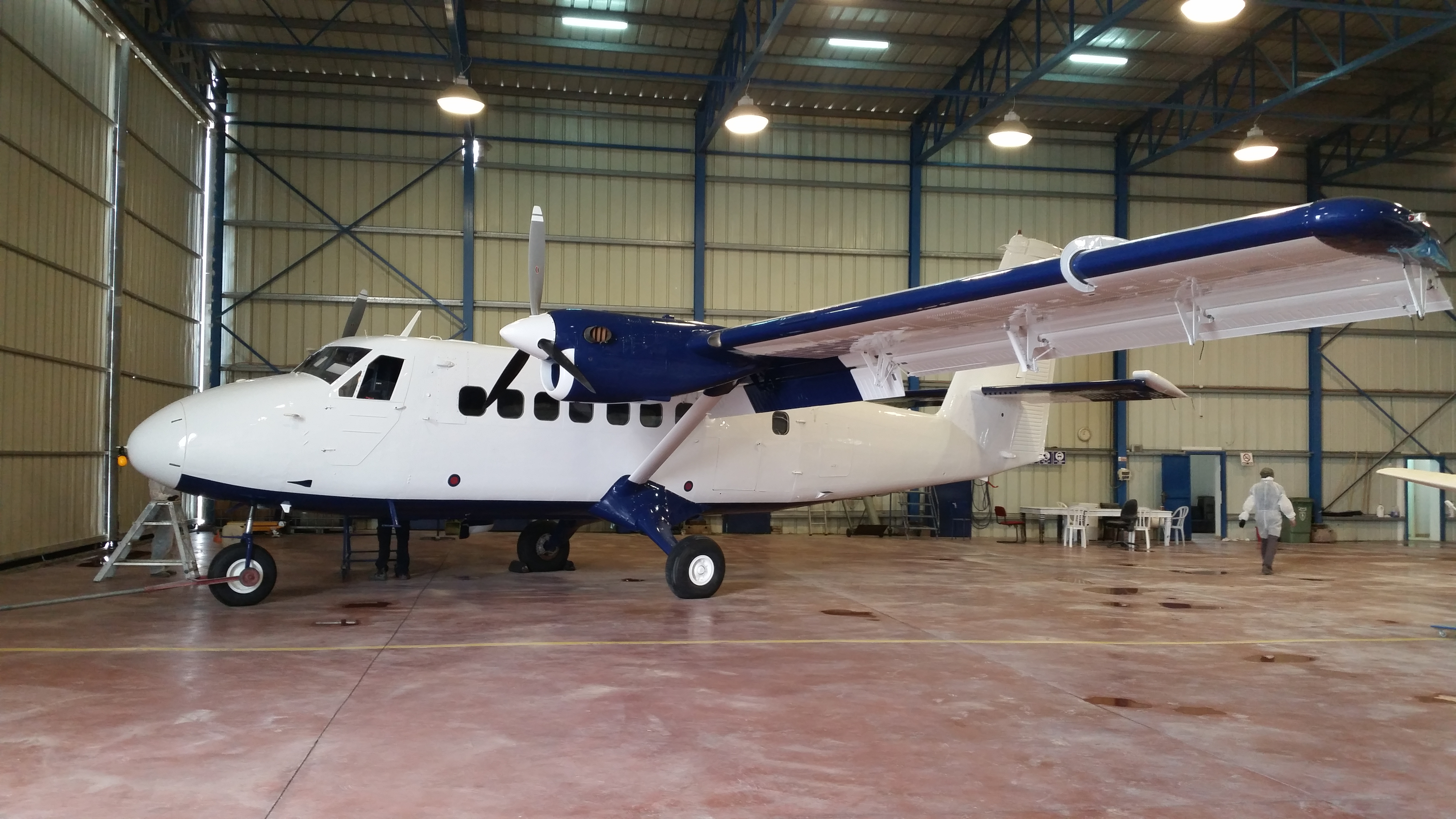 מטוס הדאש 6 בשירות עיט. משמש להצנחות. חונה במנחת תימן.